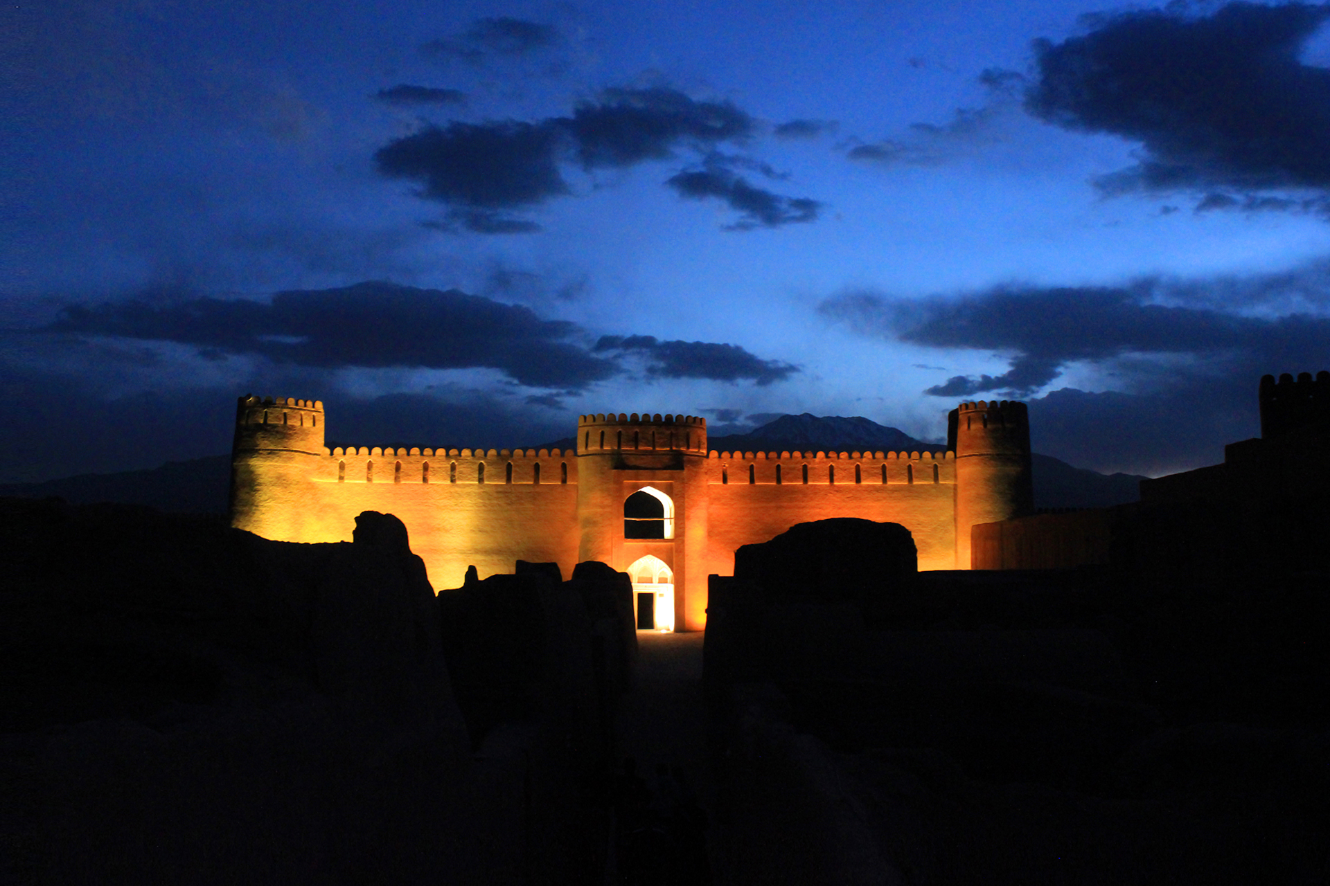 ارگ راین _عکس: یوسف بالائی